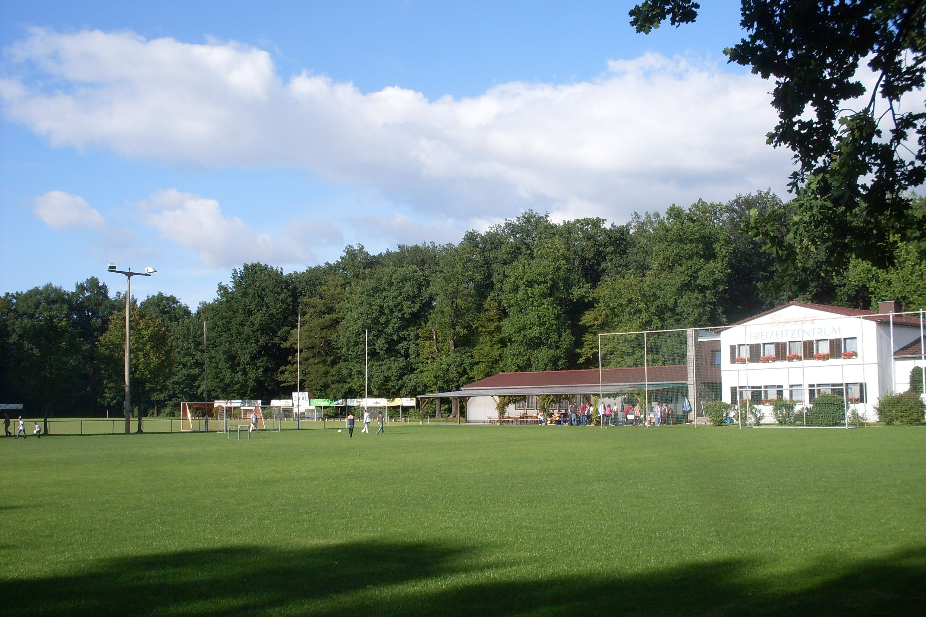 Sportplatz von Deutschbaselitz